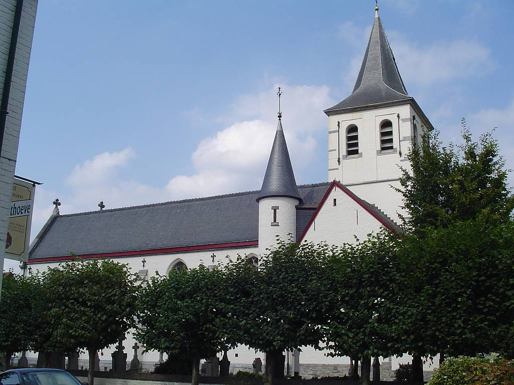 Sint-Martinuskerk in het centrum van Sint-Martens-Latem. Zijaanzicht (drie beuken niet zichtbaar)